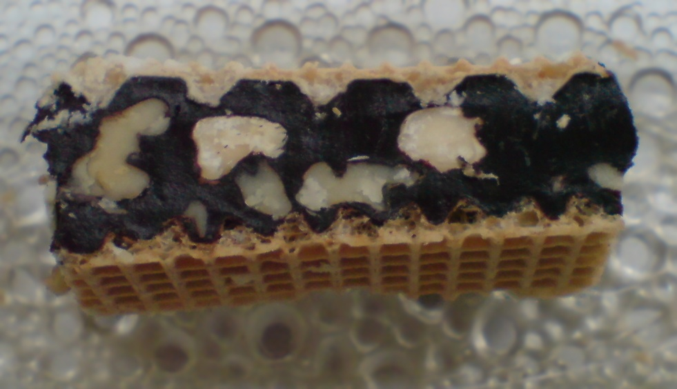 kawałek nugata czekoladowo-orzechowego na waflu; przekrój